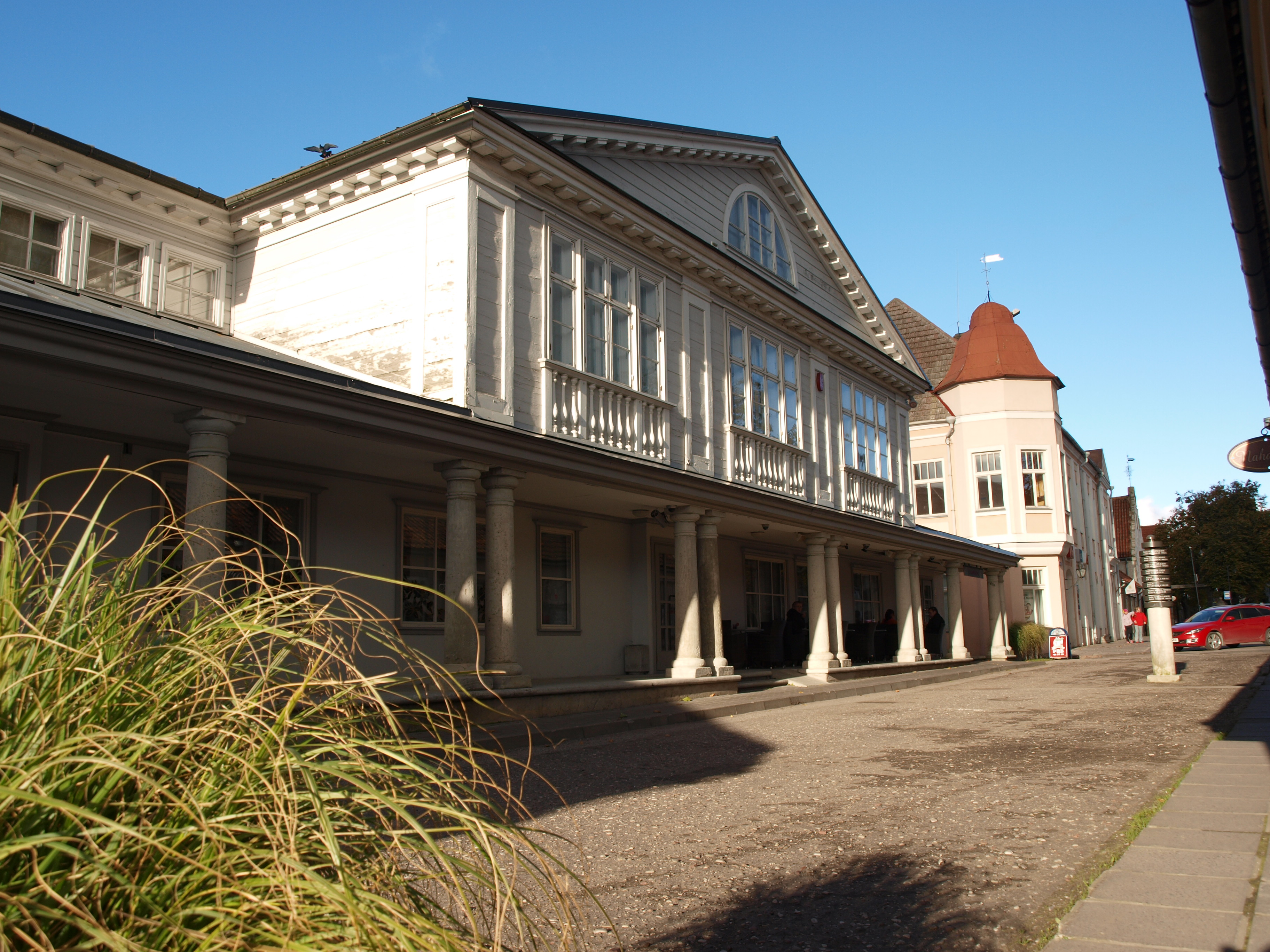 Kuressaare kaubahoovi ärihoone.